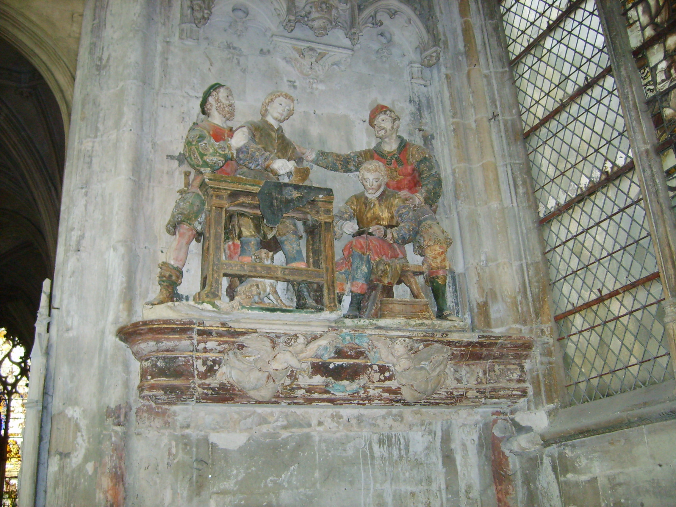 L'arrestation des saints Crépin et Crépinien, saints-patrons des tanneurs (groupe sculpté polychrome de l'église Saint-Pantaléon de Troyes (vers 1540-1560)).